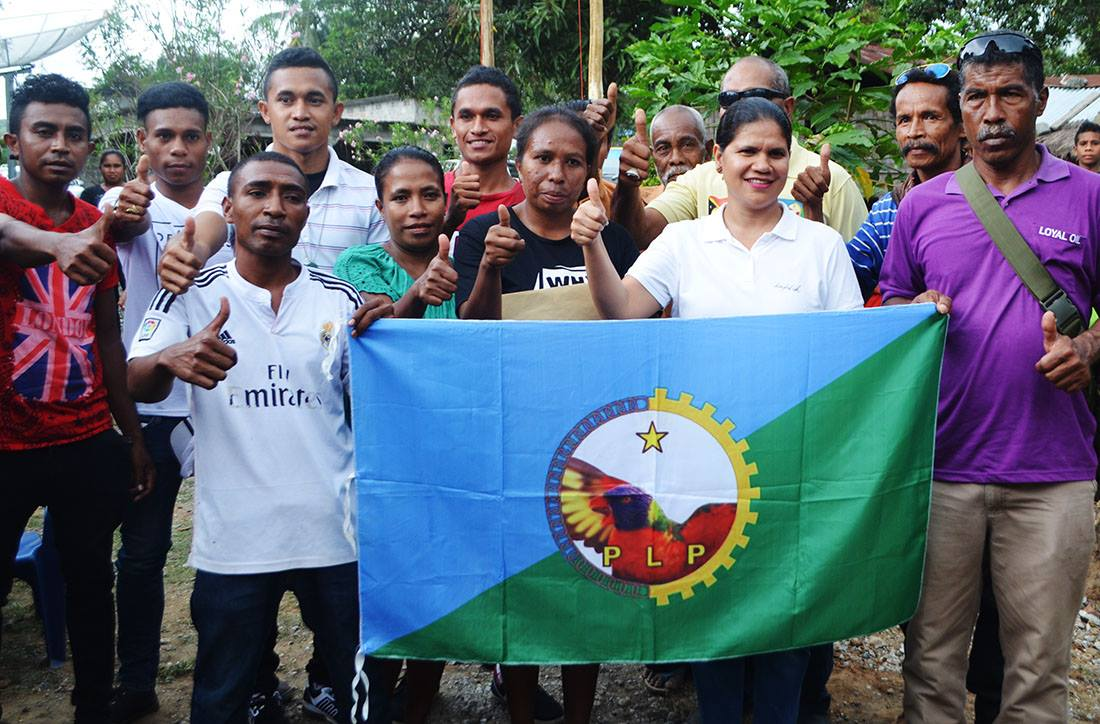 Gründung eines Ortsverbandes der Partidu Libertasaun Popular im Suco Sananain, Verwaltungsamt Laklubar, Gemeinde Manatuto